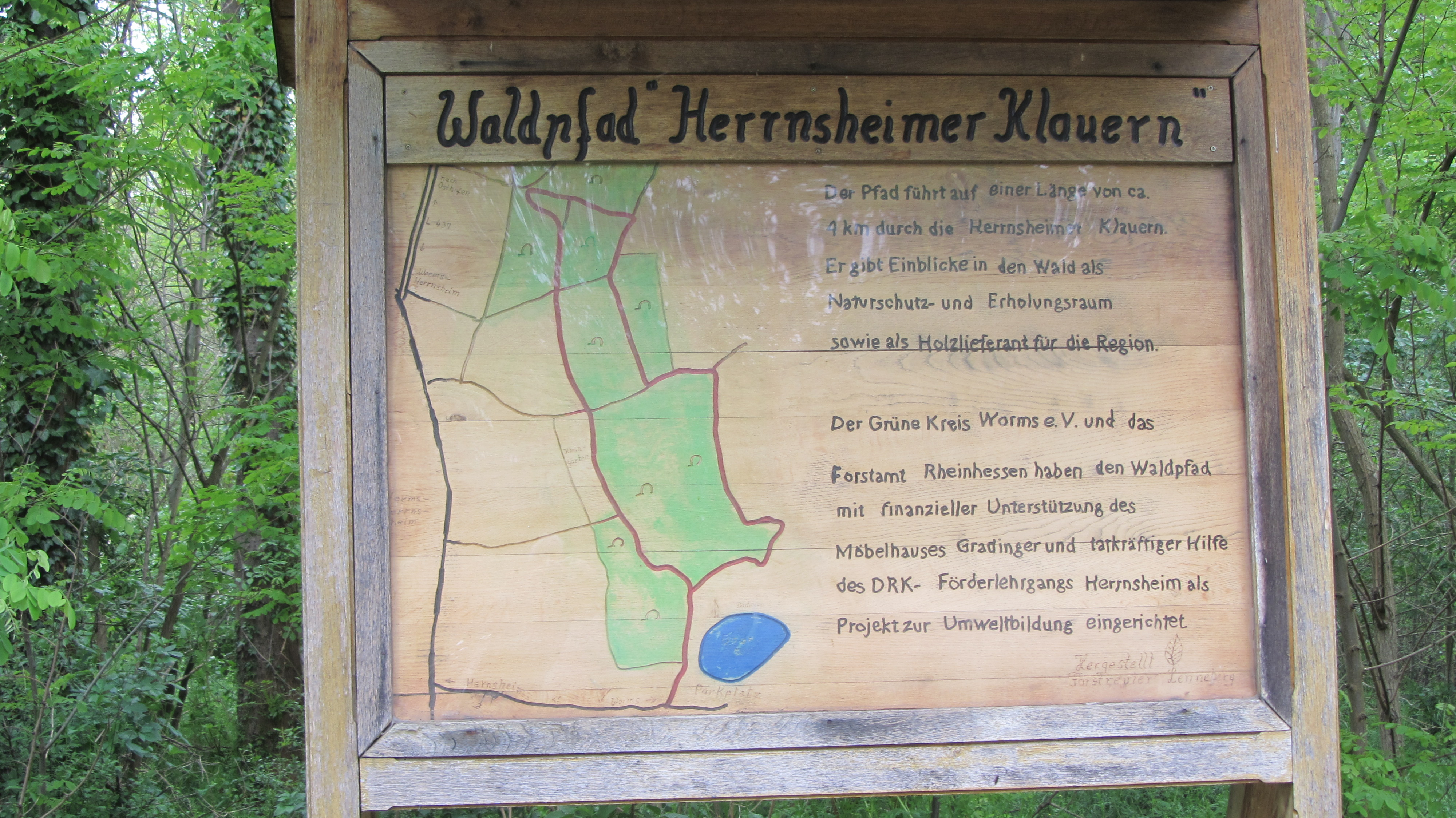 Sentier Herrnsheimer Klauern